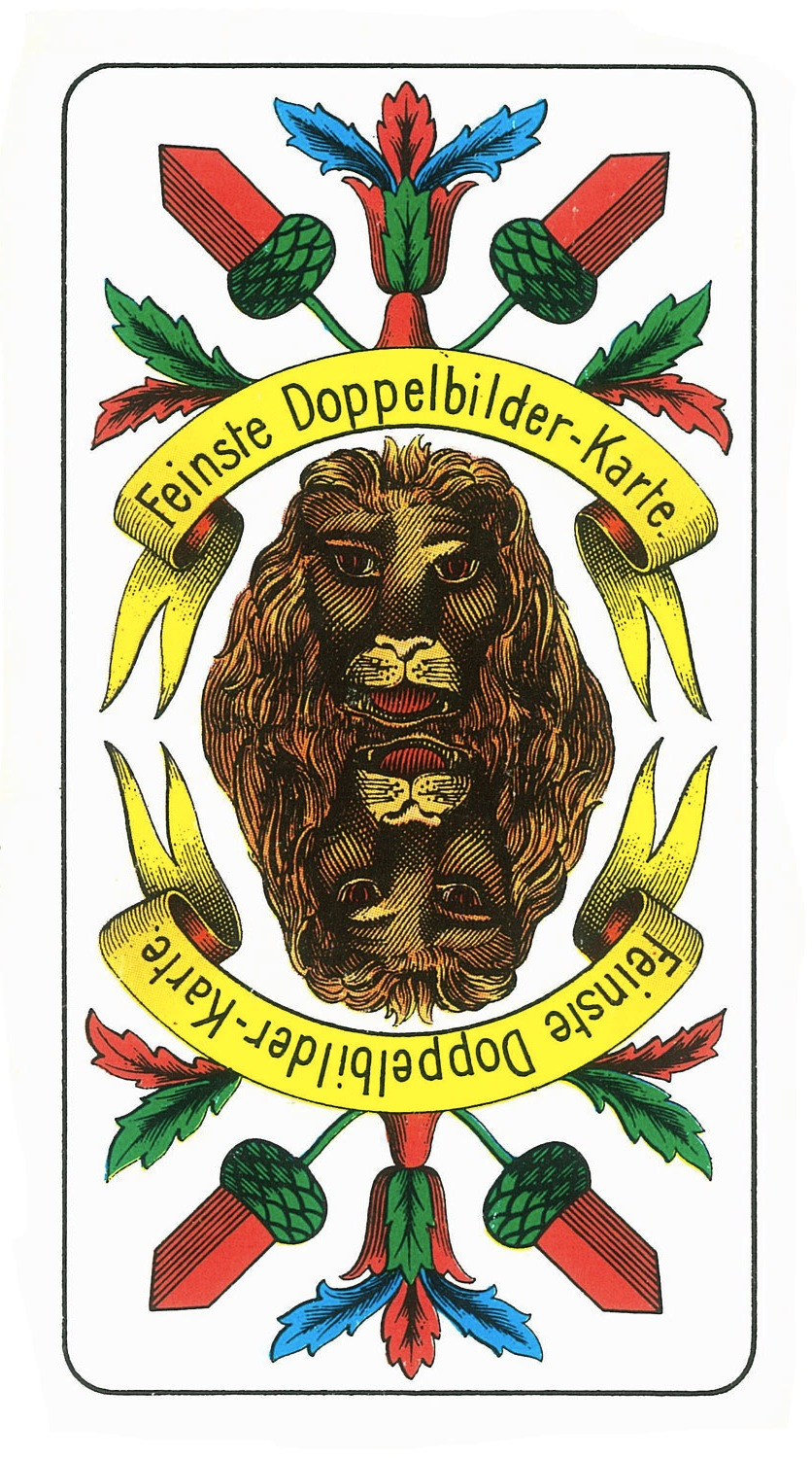 Carte utilisée pour l'Epée-Gland : le Lion épée-gland